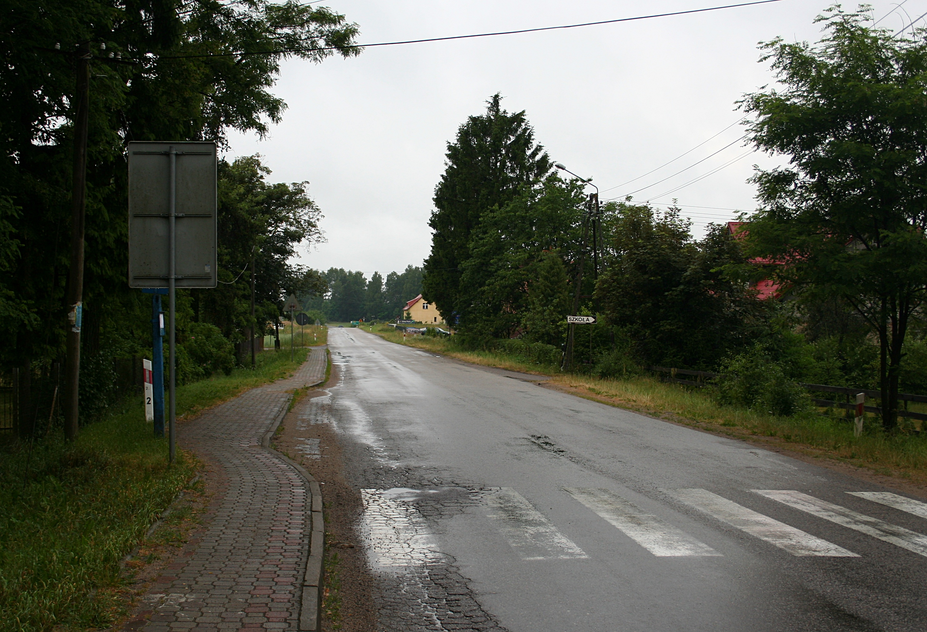 Droga wojewódzka nr 211 w miejscowości Rokity, woj. pomorskie